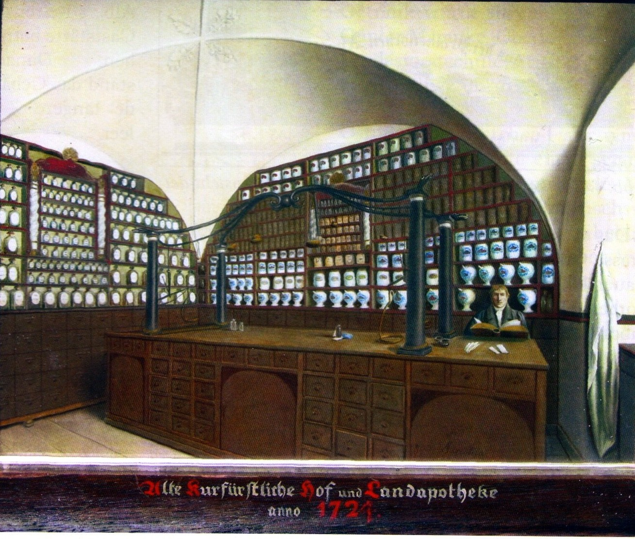 Gemälde des Inneren der Kurfürstlichen- und Landesapotheke Arnsberg. Zu sehen ist der Apotheker Johann Willibald Brisken